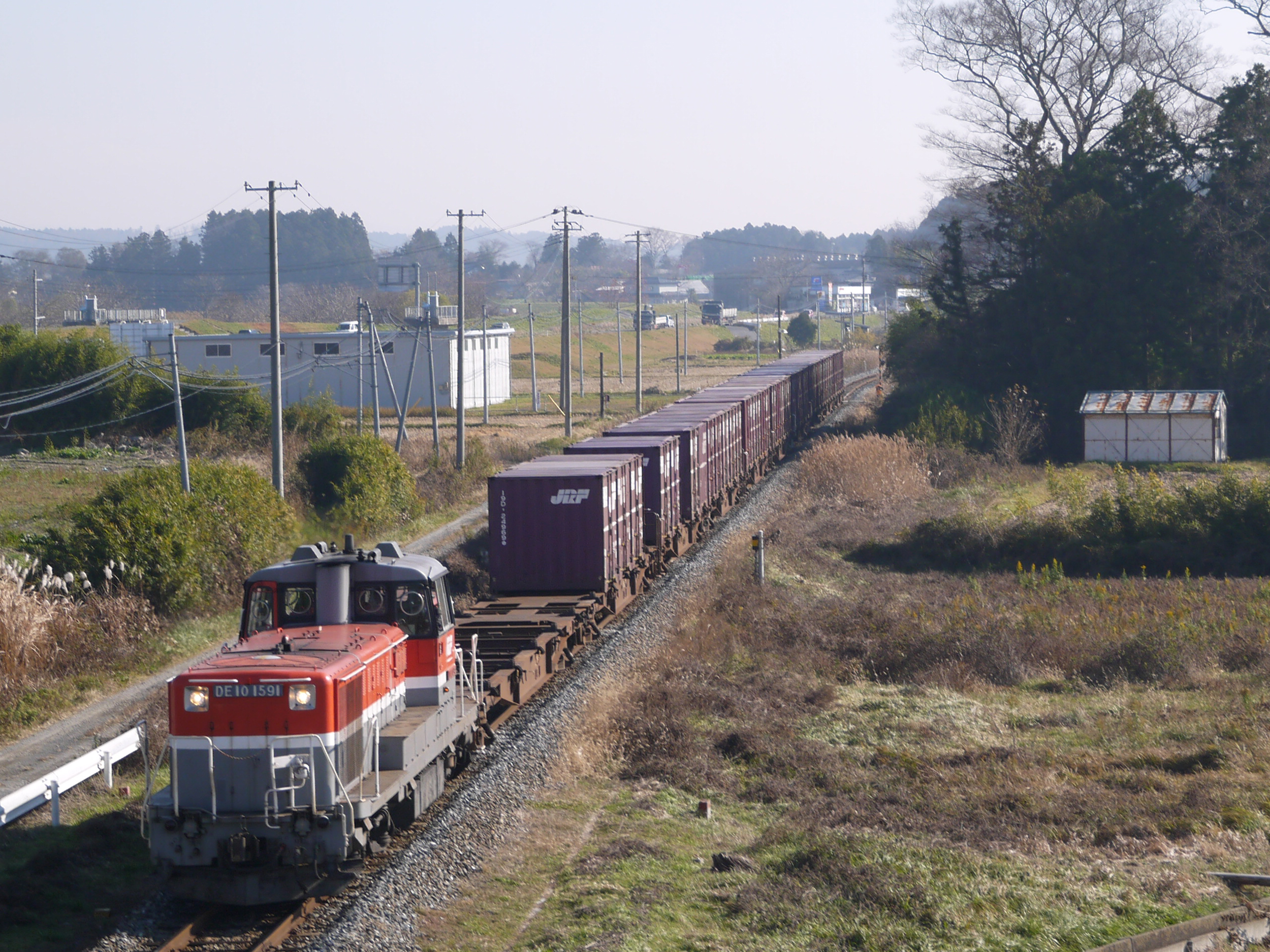 JR石巻線を走るDE10形機関車(DE10 1591)とコンテナ車両（湧谷～前谷地）